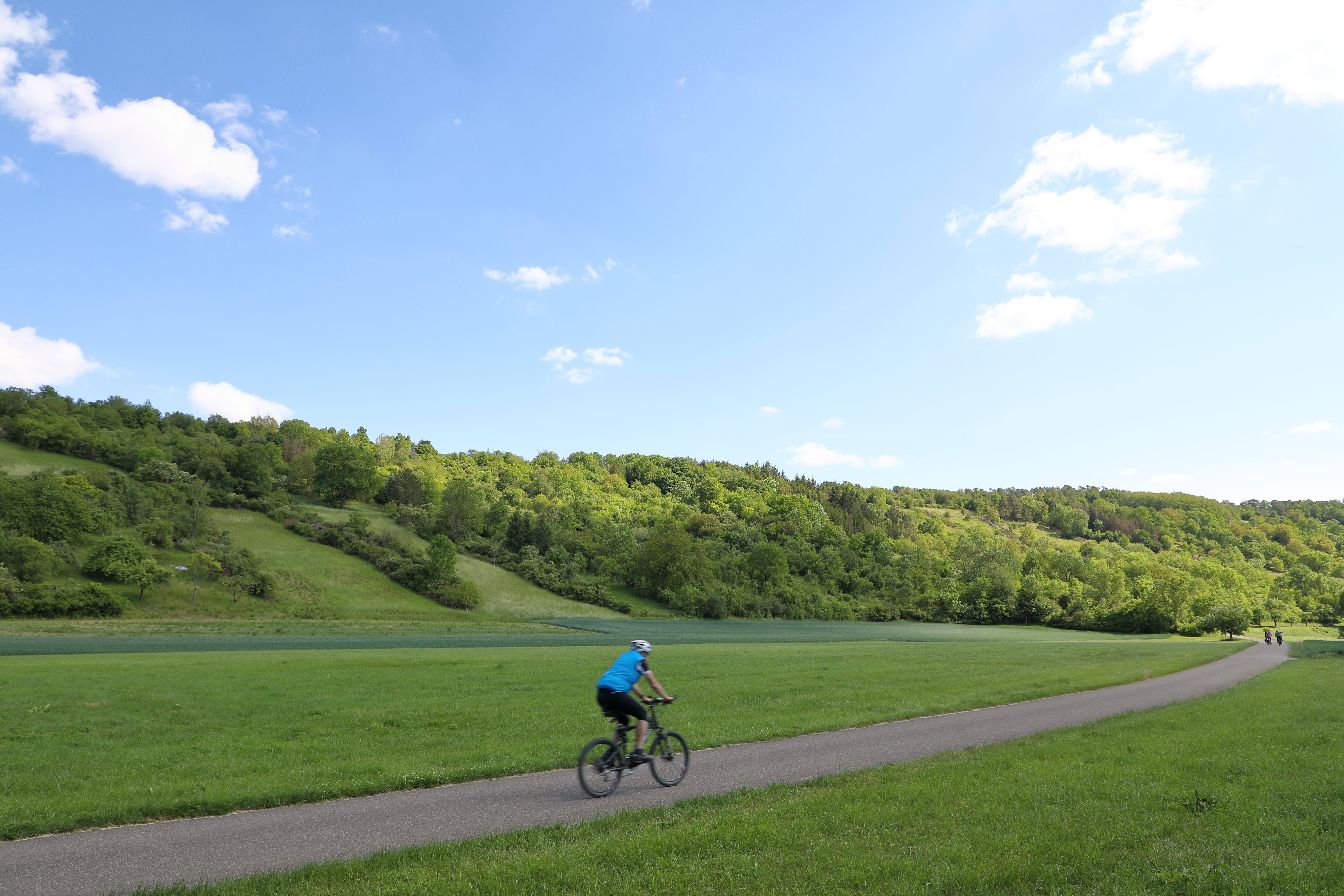 Blick vom Taubertal auf das Wasserschutzgebiet Egelsee Weikersheim. Im Vordergrund der Taubertalradweg.